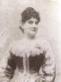 Fáncsy Ilka magyar színésznő.